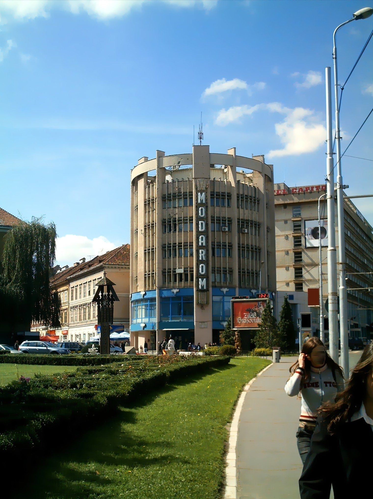 A villa helyén álló volt Modarom áruház épülete.